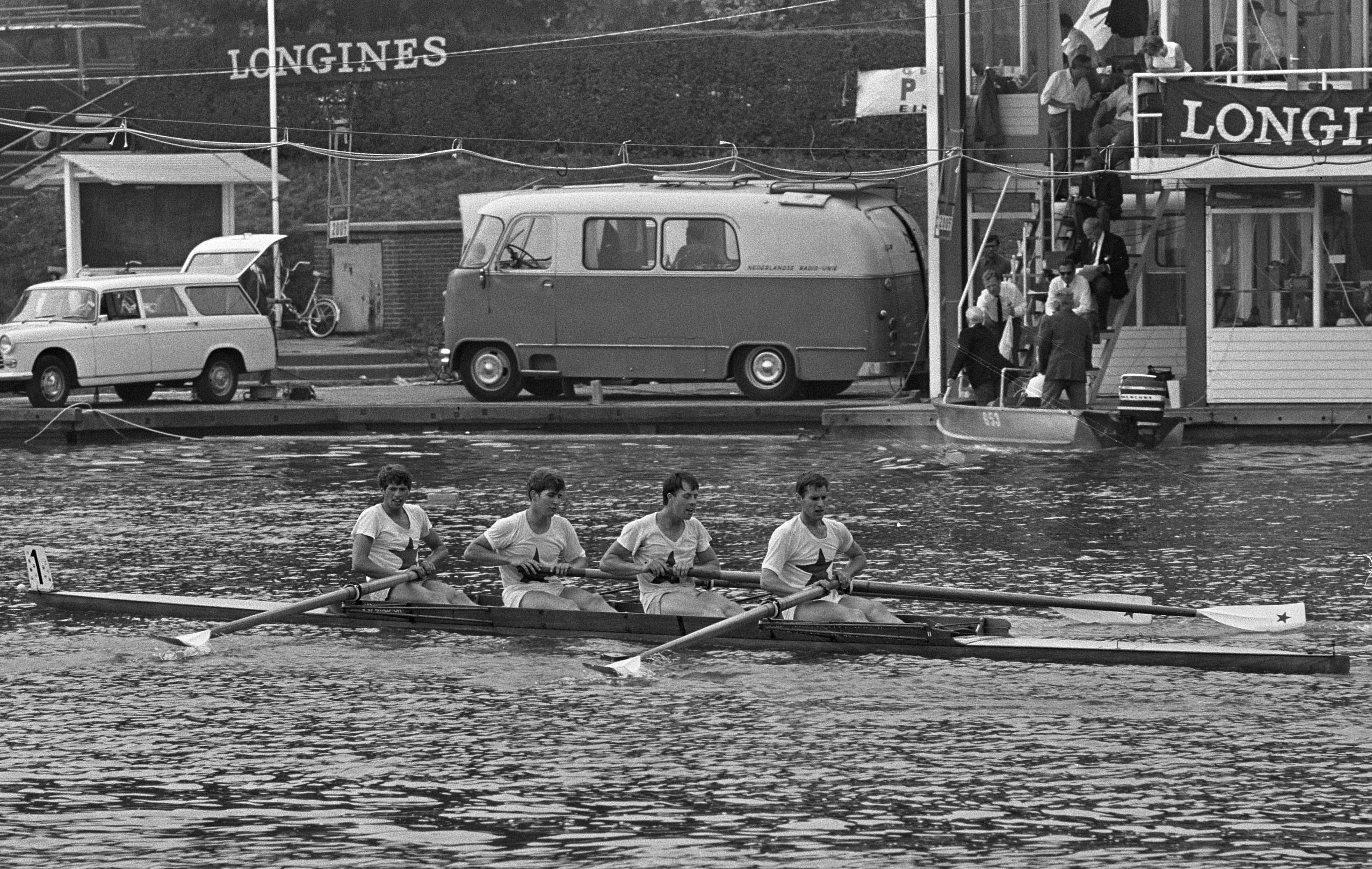 Vier zonder stuurman van Aegir, v.l.n.r. Mulder, Maarleveld, Luyendijk, Rouwe